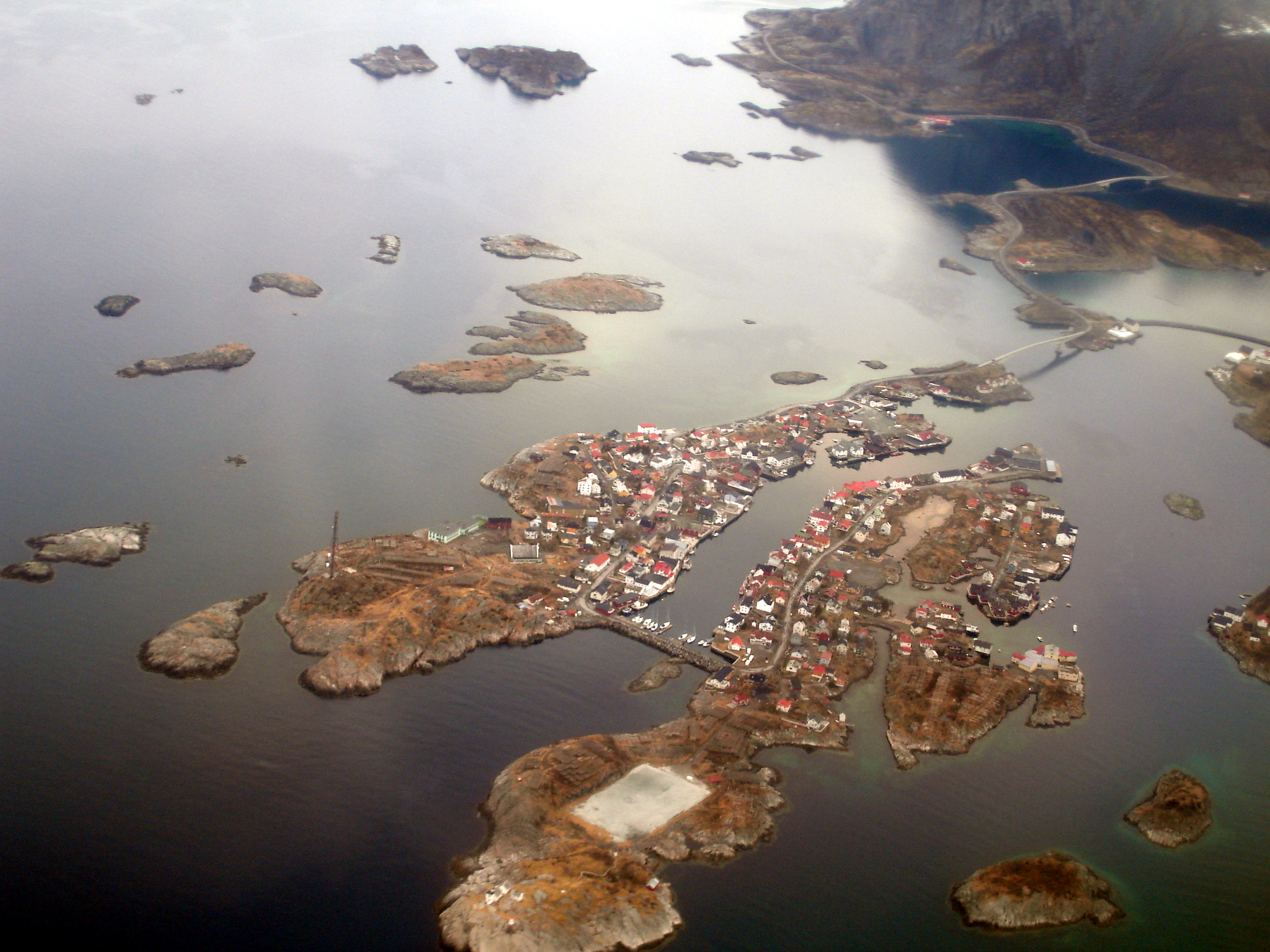 Henningsvær in Lofoten, Norway